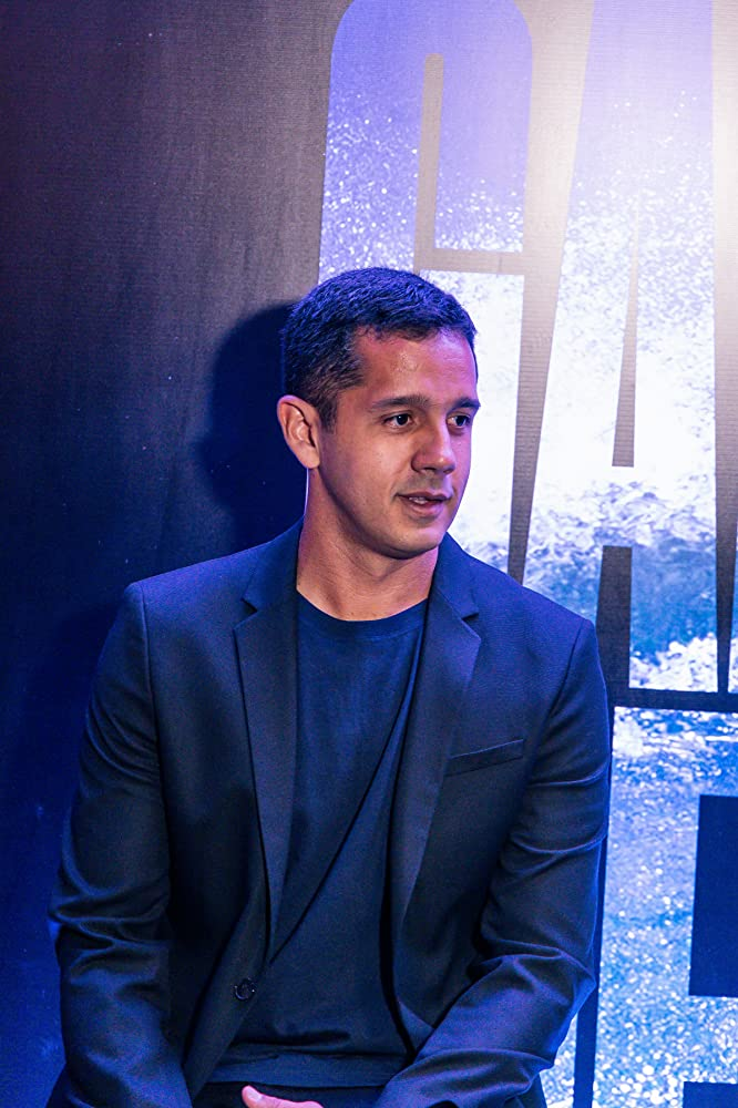 Henrique Daniel na pré-estreia do filme Gabriel Medina